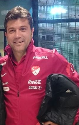 Vedat İnceefe U19 Milli maç sonrasında